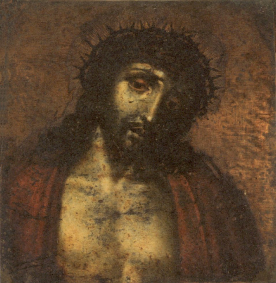 retablo